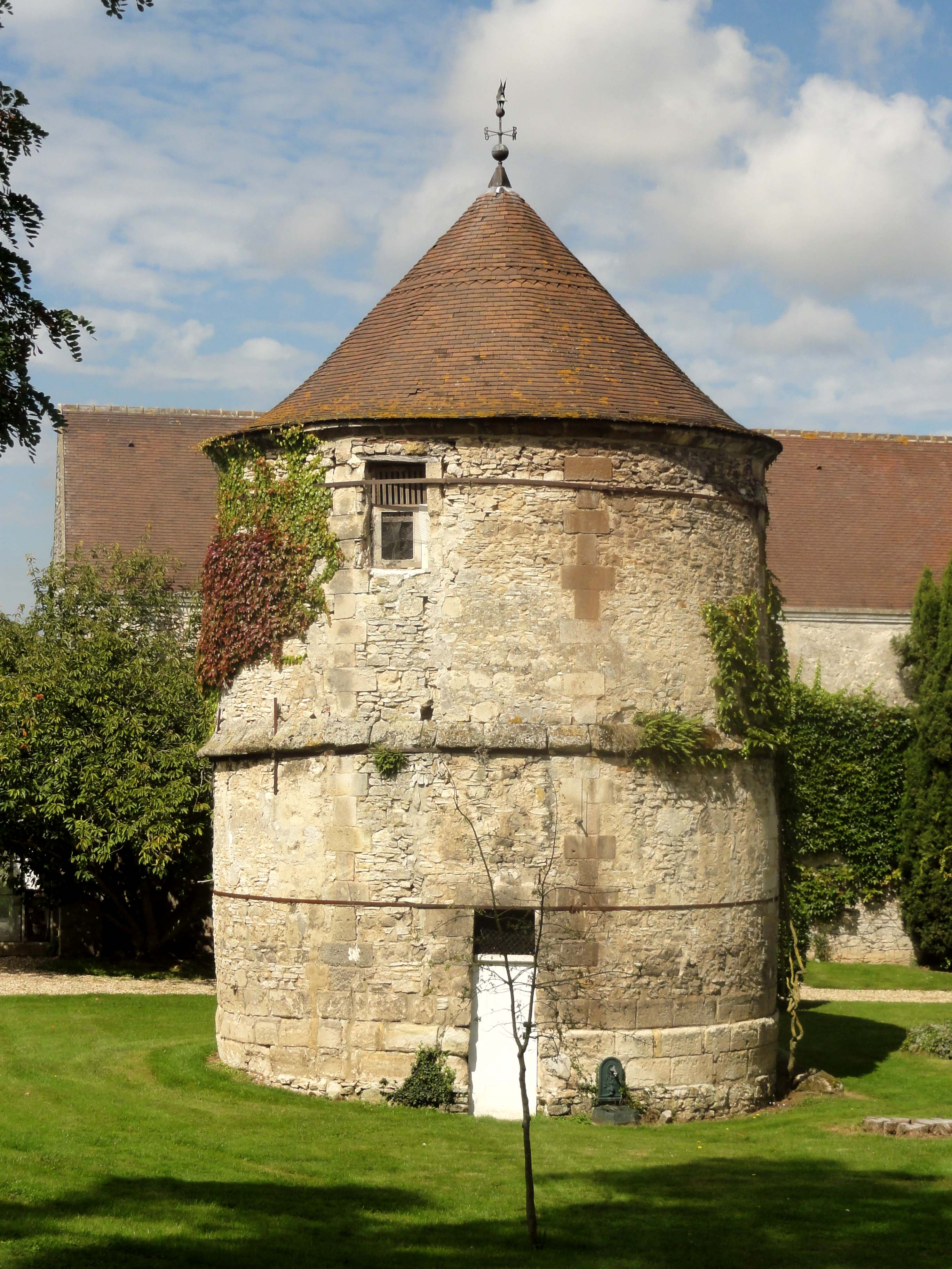 Colombier.